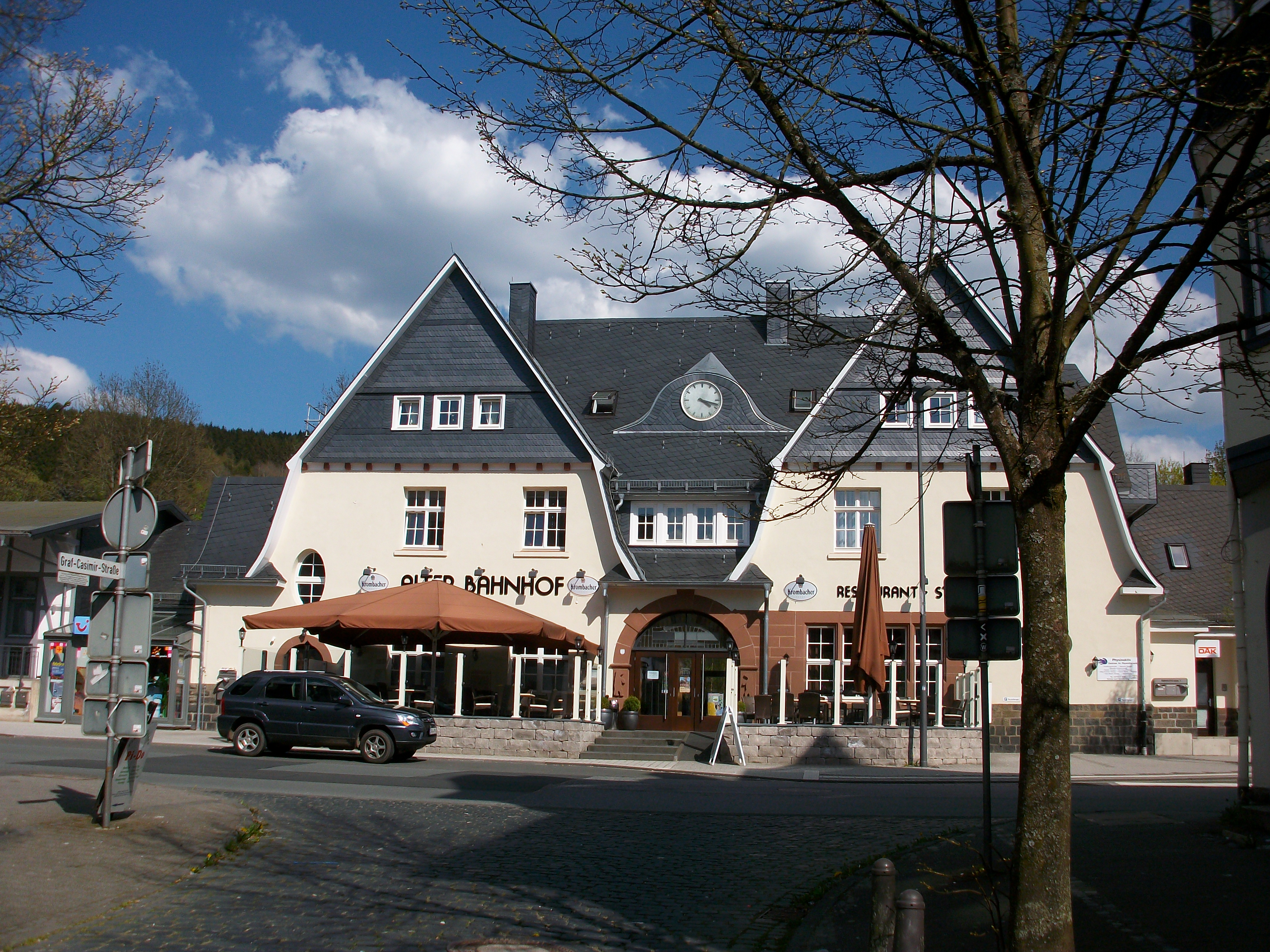 Bahnhof Bad Berleburg (2016)